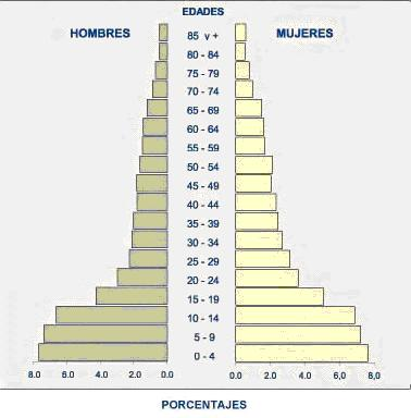 Piramide de la población de Alausi (Datos del 2001)